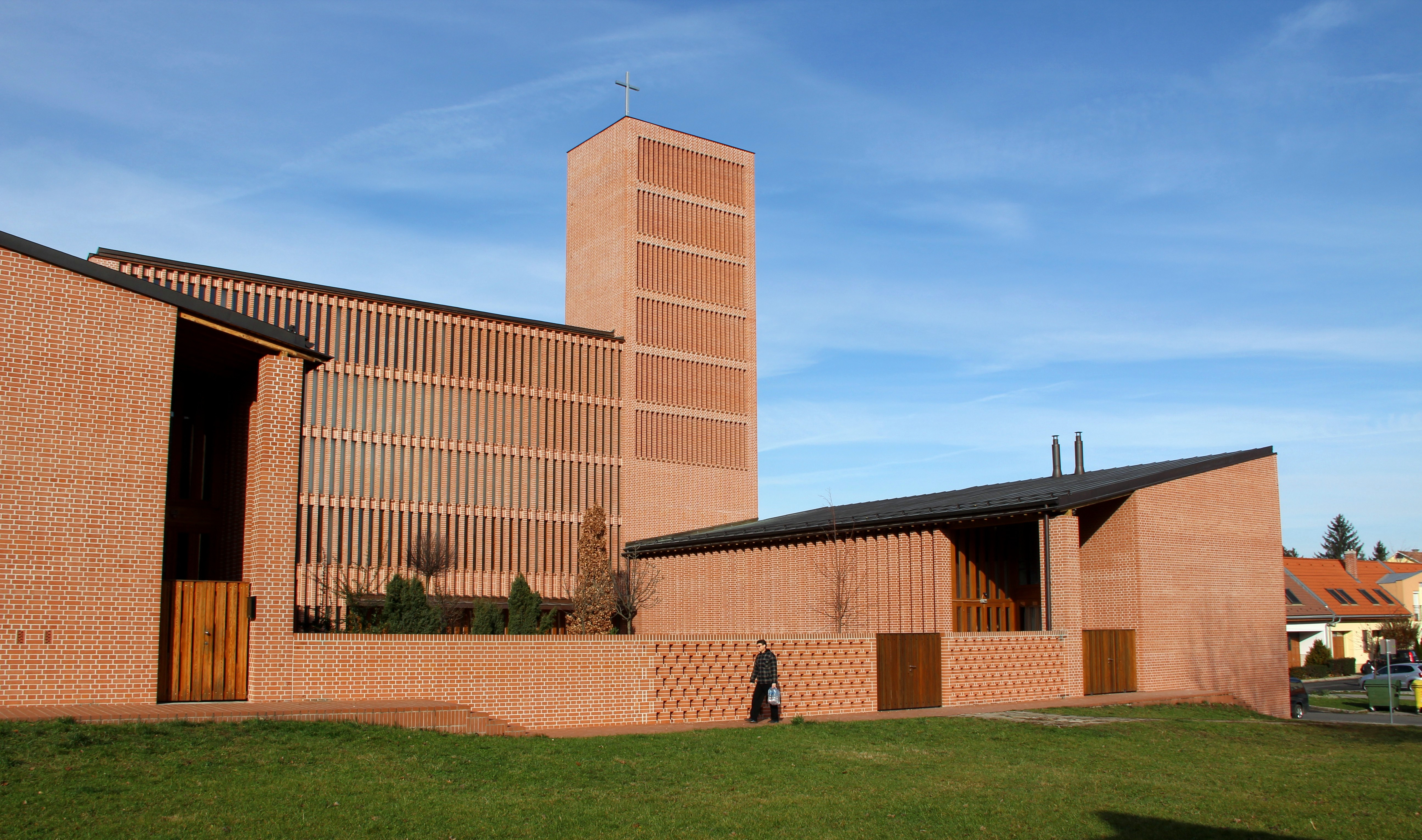 Szentháromság templom, Gödöllő